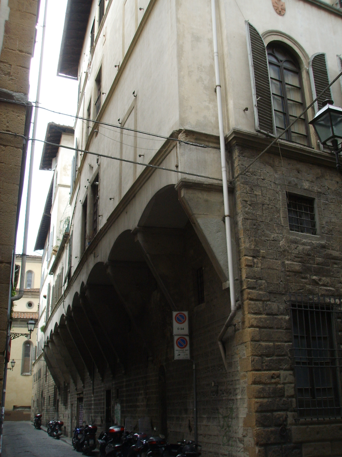 Palazzo machiavelli 04 sporti